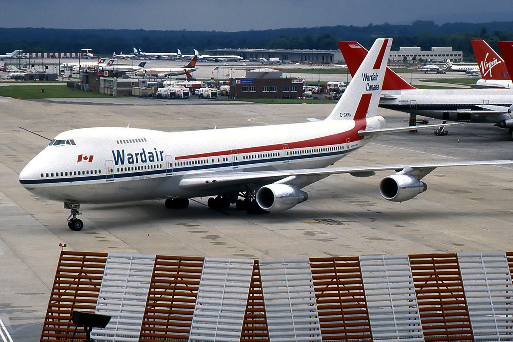 C-GXRA B747 Wardair